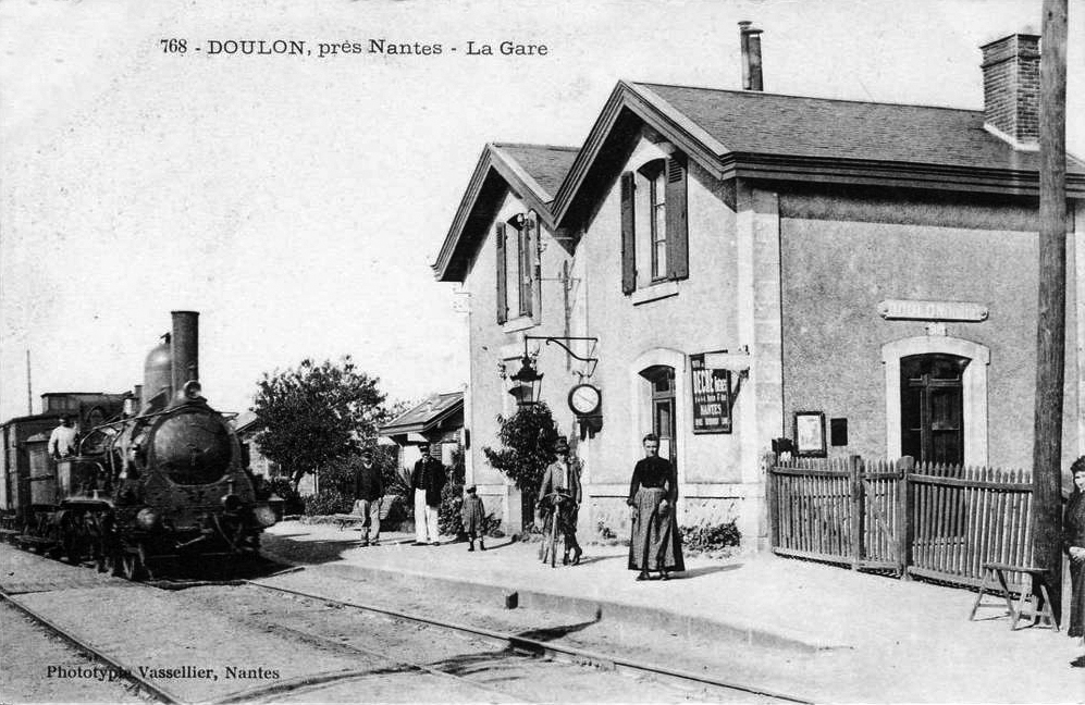 La halte de Doulon avec ses deux bâtiments accolés identiques vers 1900